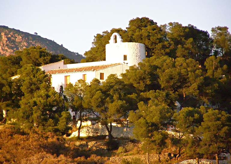 La ermita de la magdalena en castellon de la plana. Aqui acuden los romeros el primer domingo de la semana de fiestas